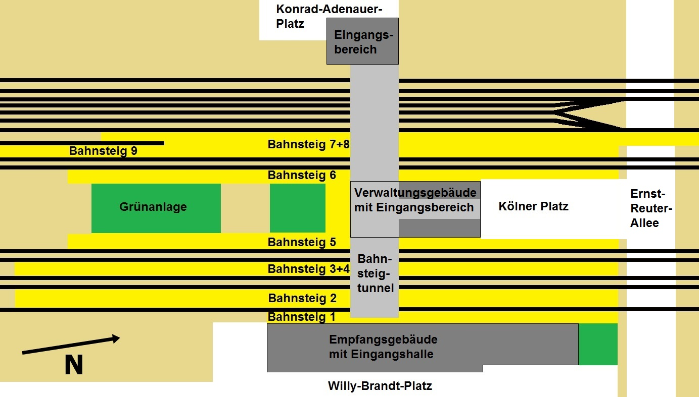 Schematische Geländeskizze des Magdeburger Hauptbahnhofs 2014